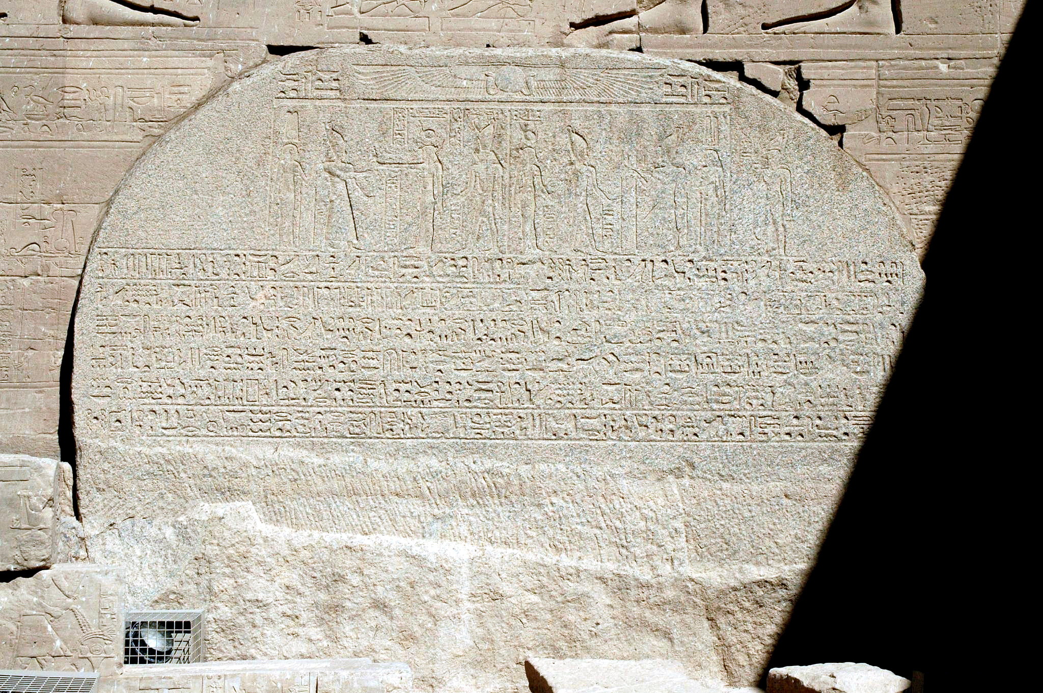 blocco di granito con iscrizioni nel secondo pilone